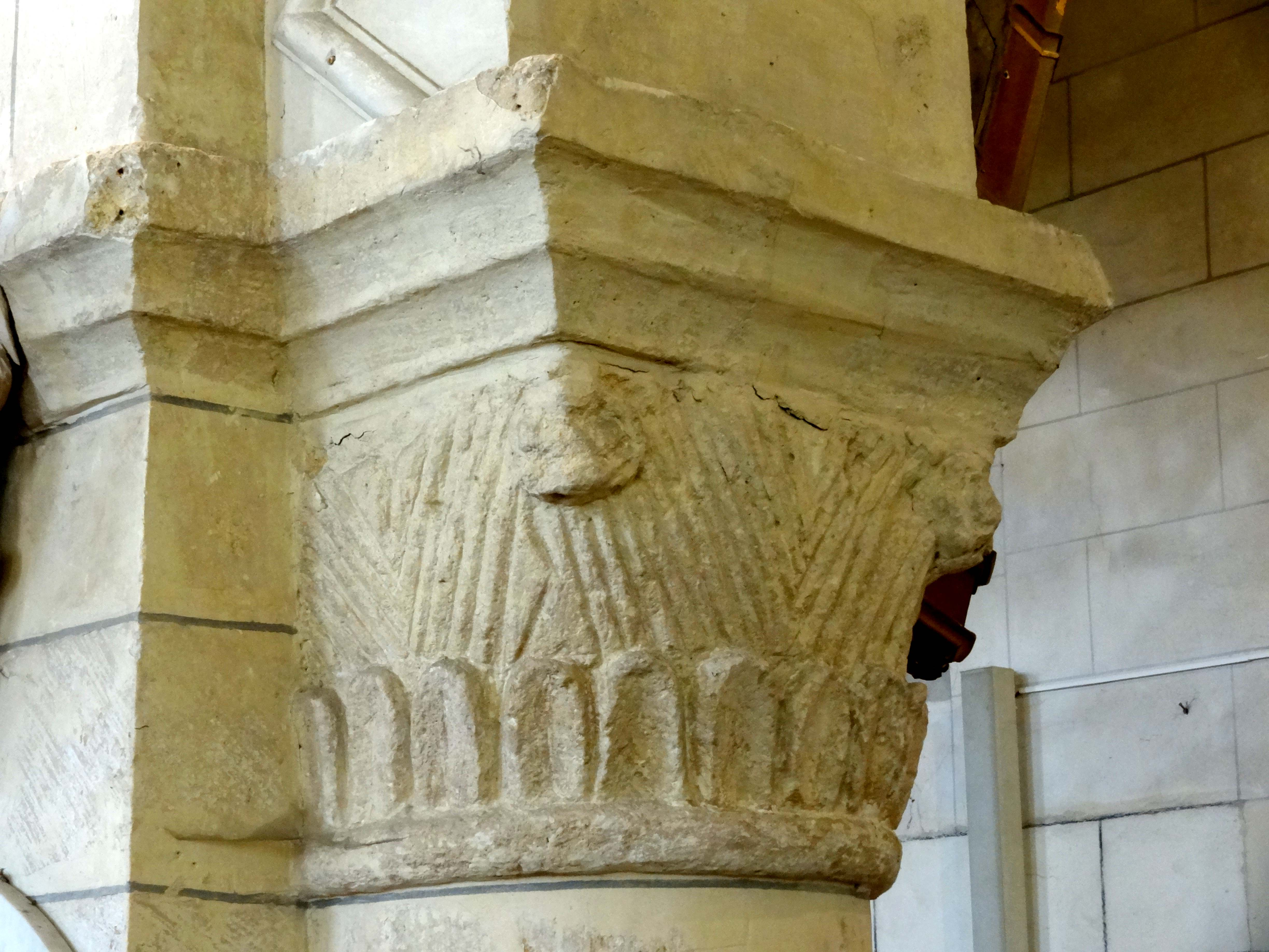 Chapiteau(x) de l'église - voir titre.